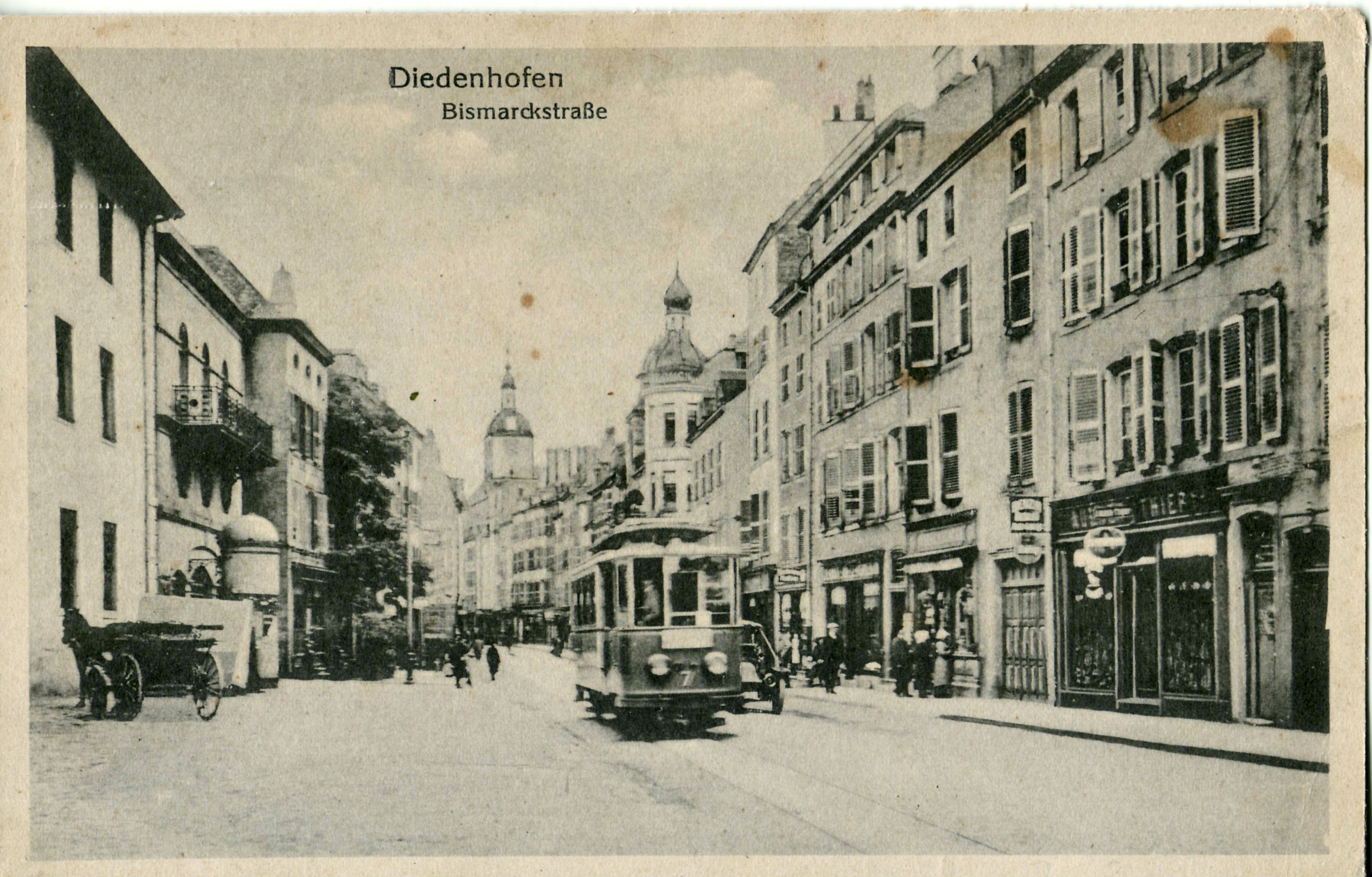 Carte postale ancienne éditée par : DIEDENHOFEN (Thionville) - Bismarckstrasse